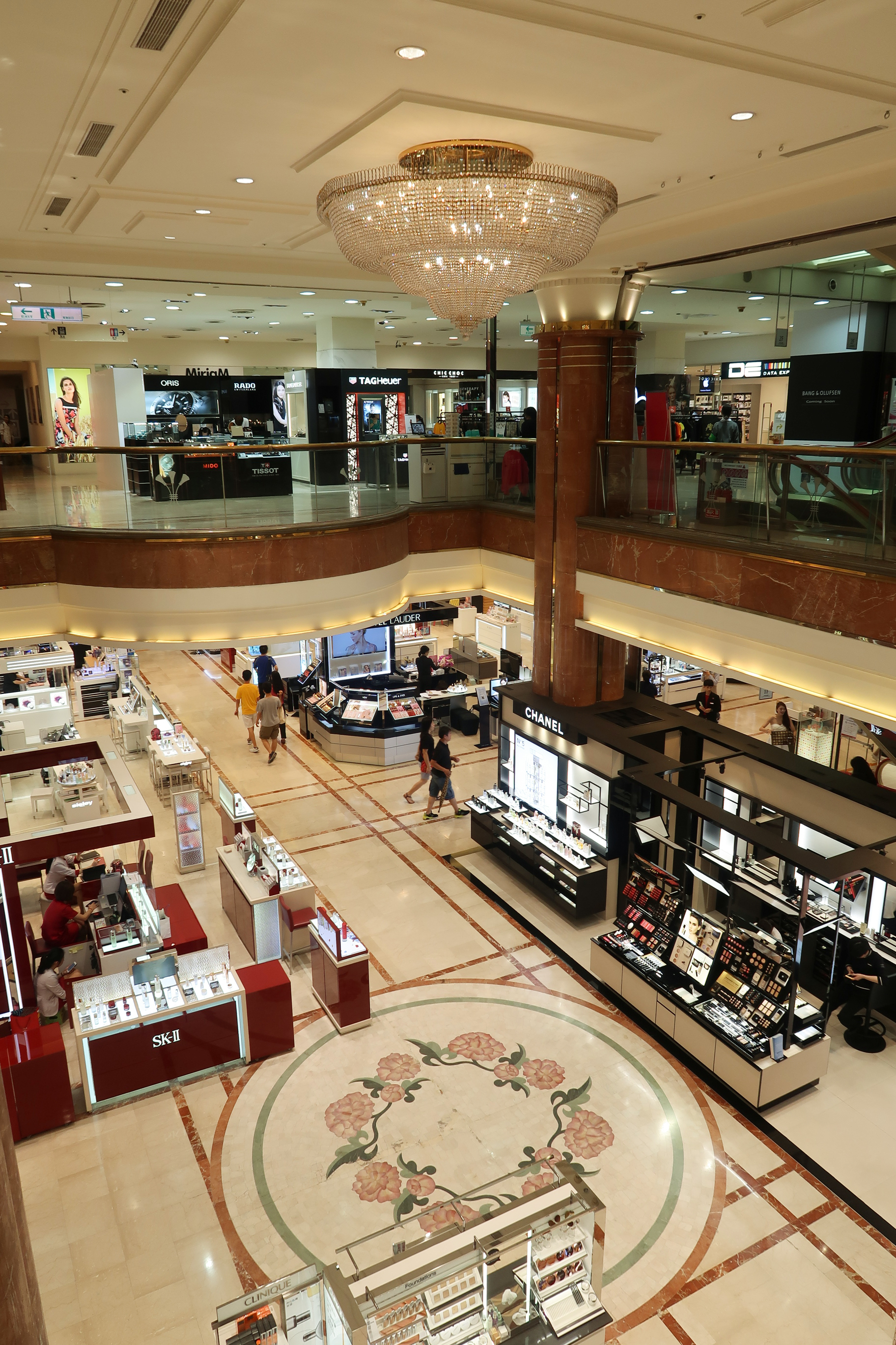 Kuang San SOGO Department Store Atrium